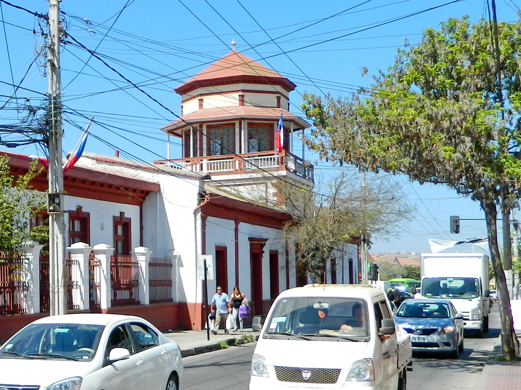 Casa Carmona This is a photo of a national monument in Chile: 599